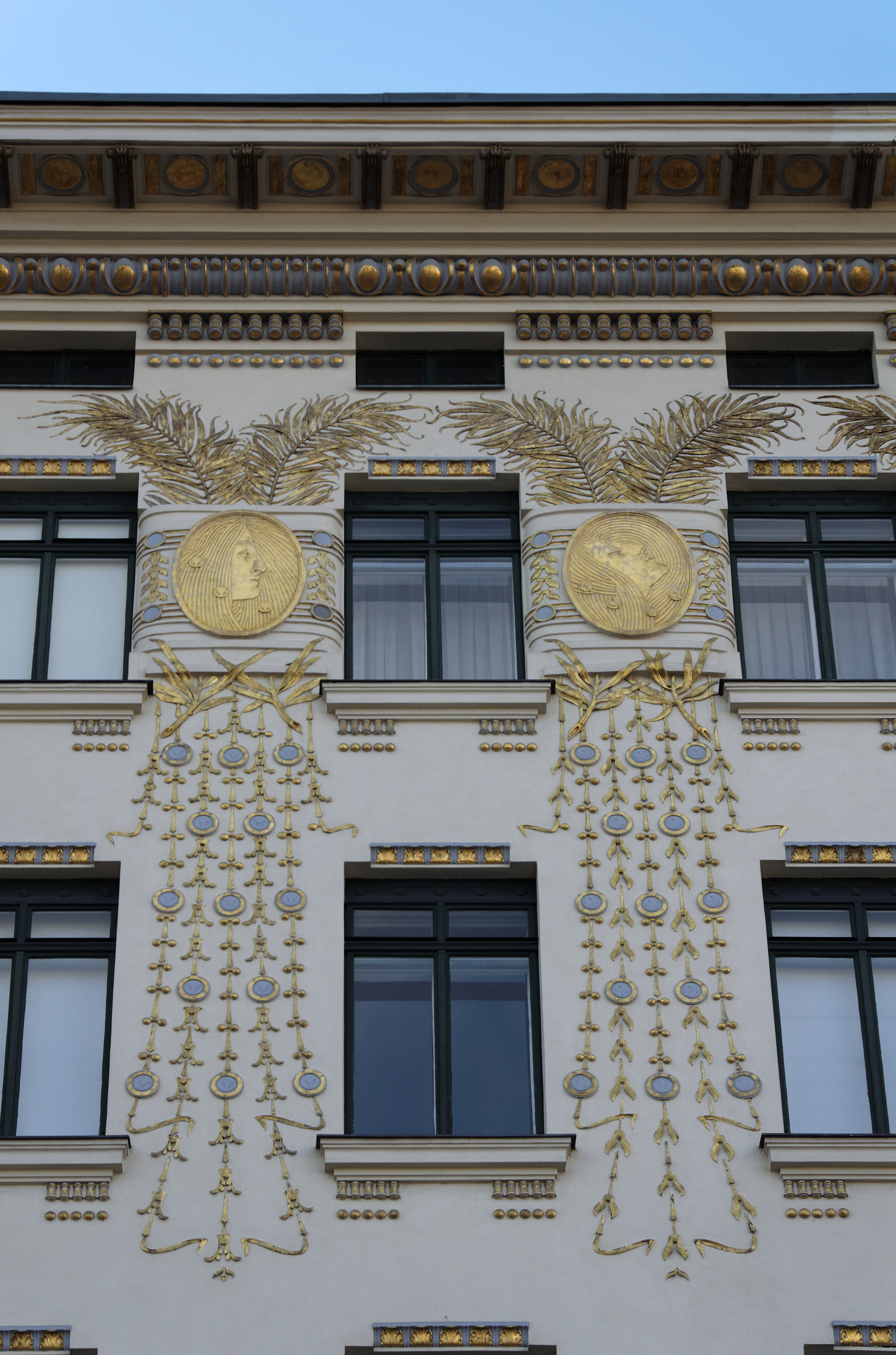 38 Linke Wienzeile, Vienne Autriche. Immeuble de Otto Wagner, construit en 1899. Motif dorés de Kolo Moser